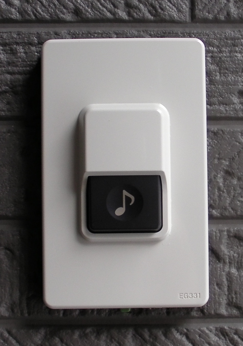 ドアチャイム用押しボタン（パナソニック電工製 EG331型）